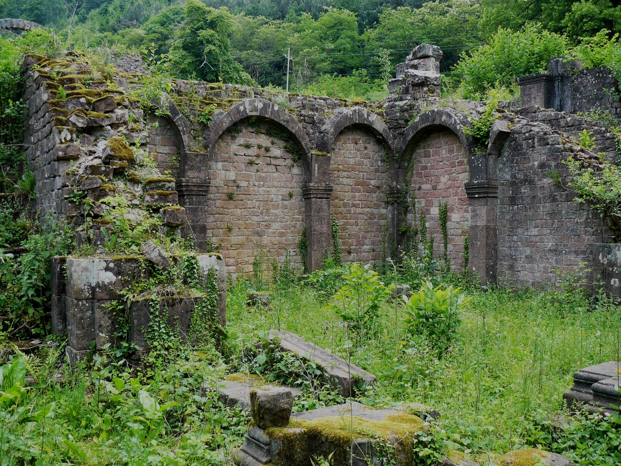 Vestiges du couvent de Niedermunster. Vue de la salle voutée de la crypte.